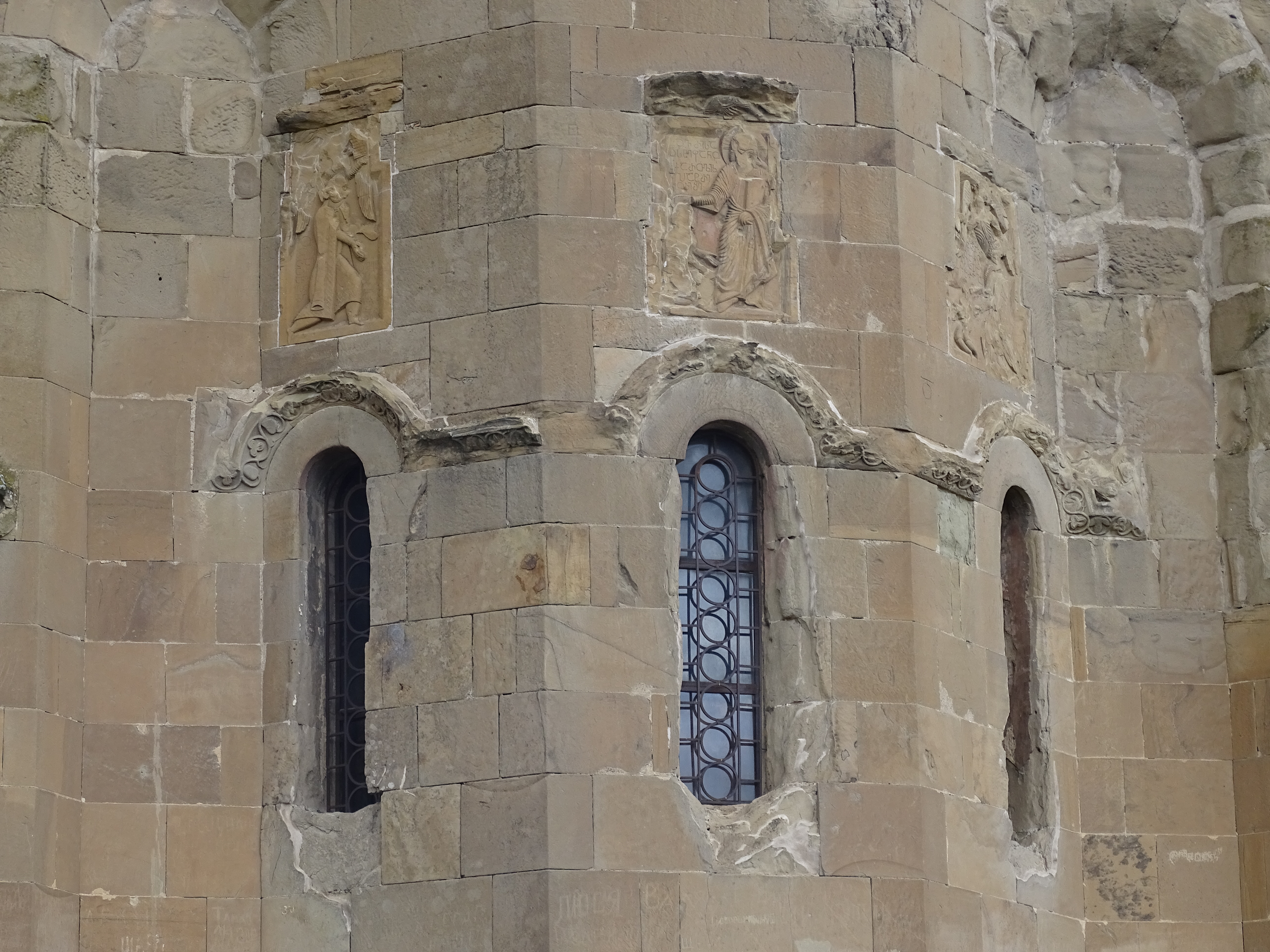 Dschwari Kirchenfenster